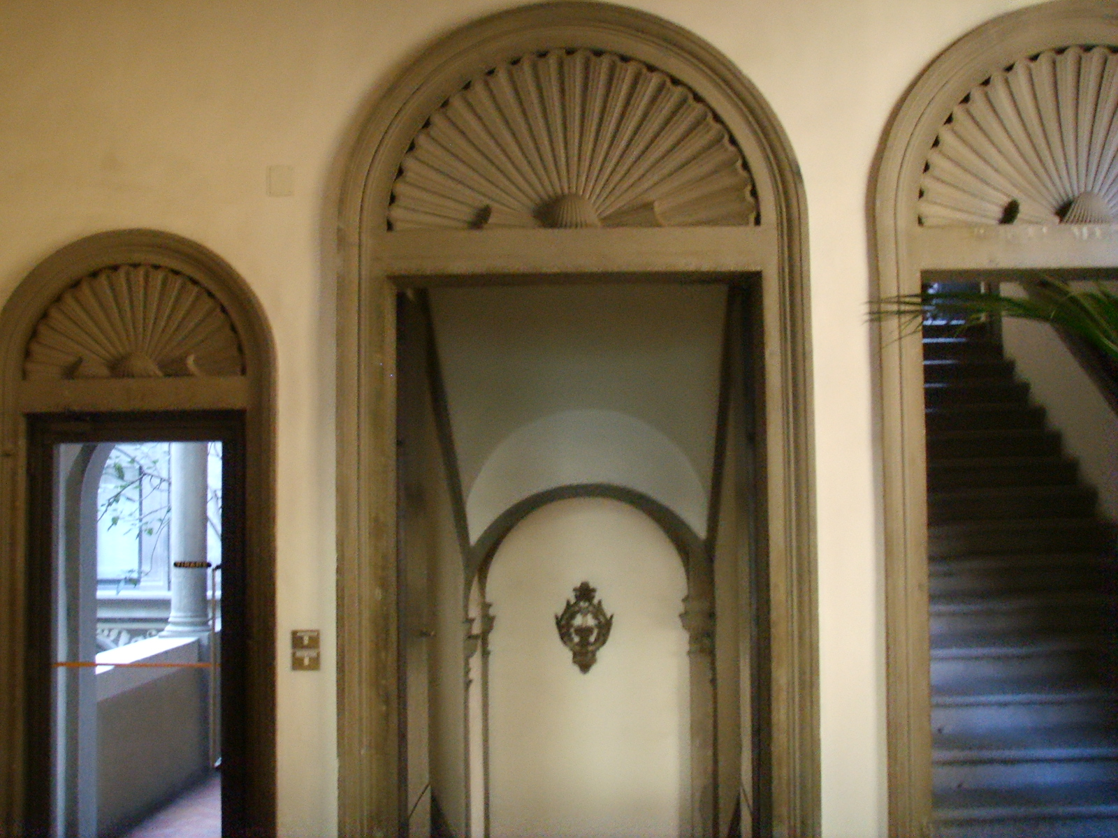 Palazzo Bartolini Salimbeni, scalinata